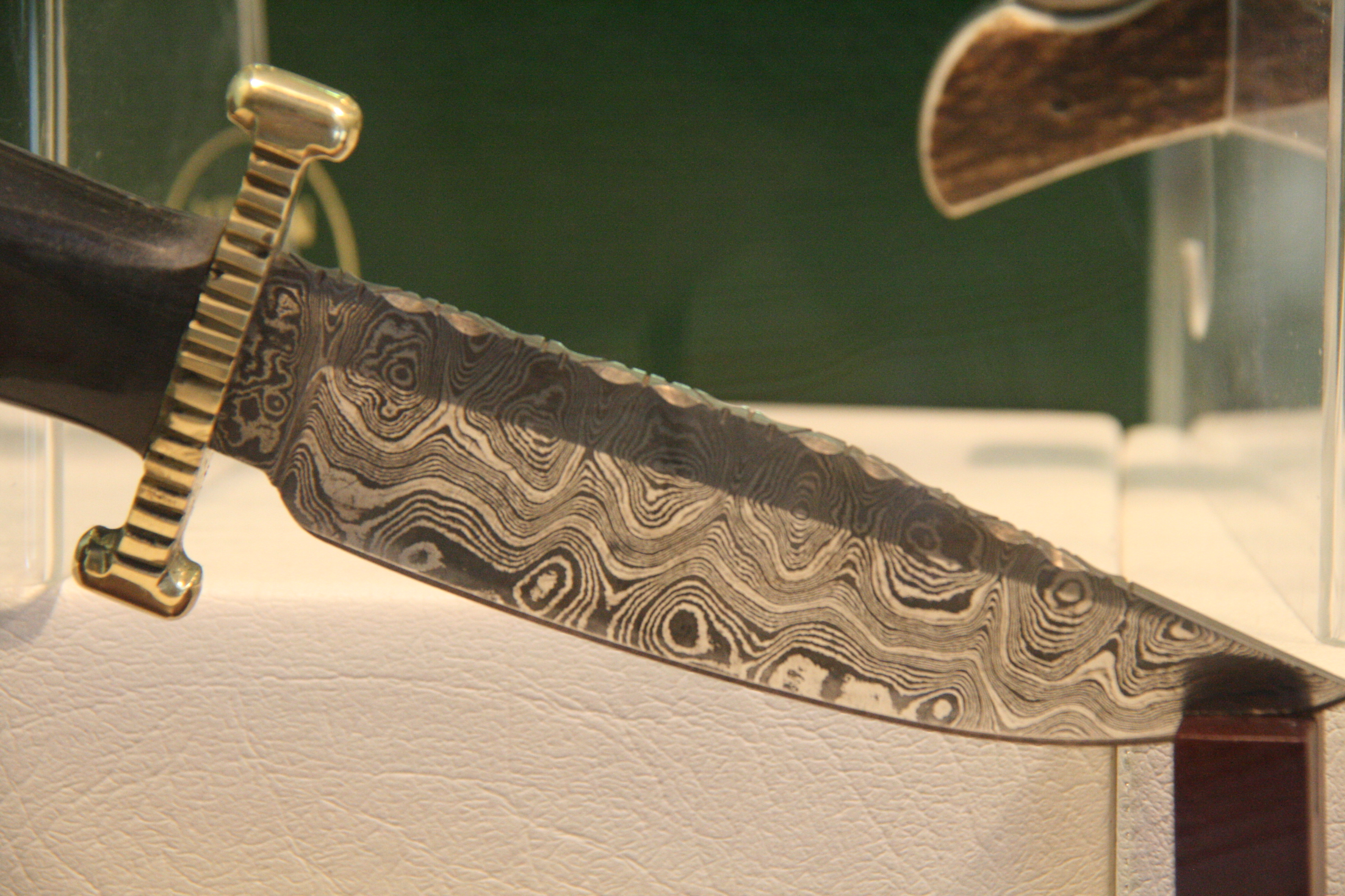 Acero damasceno - toledo